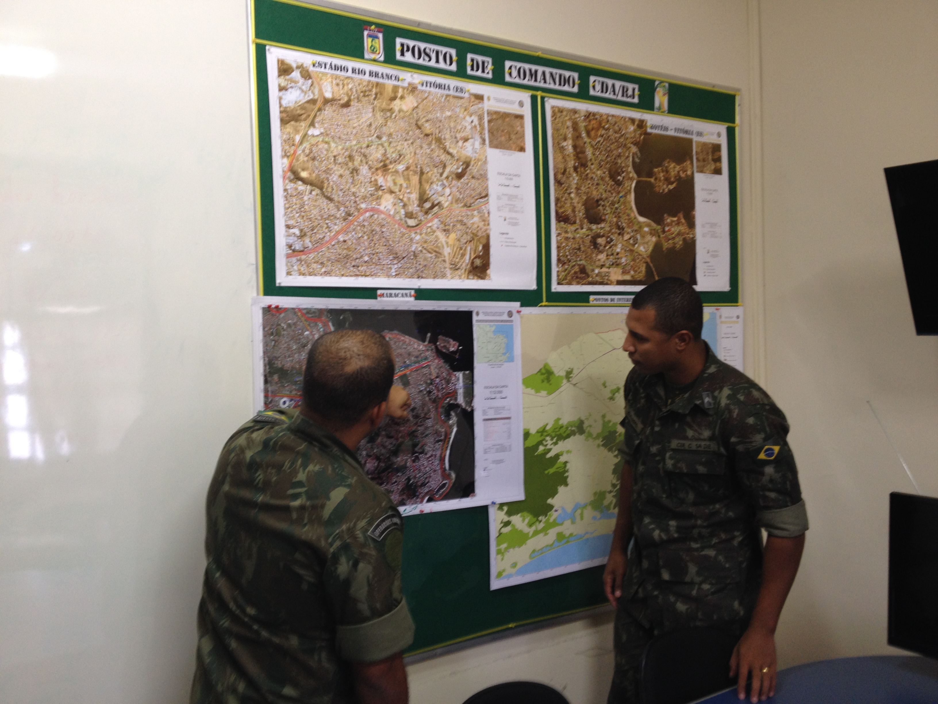 Posto de Comando do CCDA/RJ durante a Copa do Mundo FIFA 2014